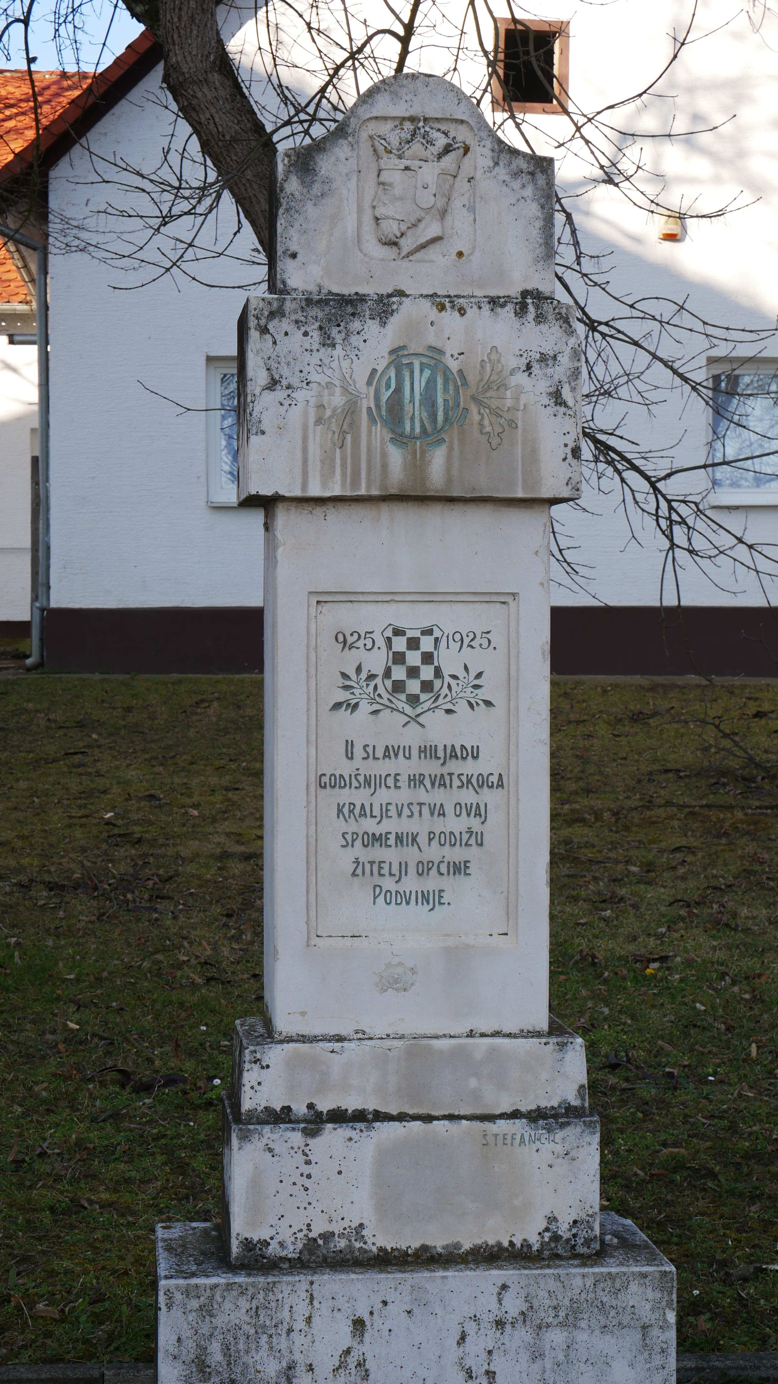 Spomenik tisućitoj godišnjici Hrvatskog kraljevstva u Slavonskom Brodu